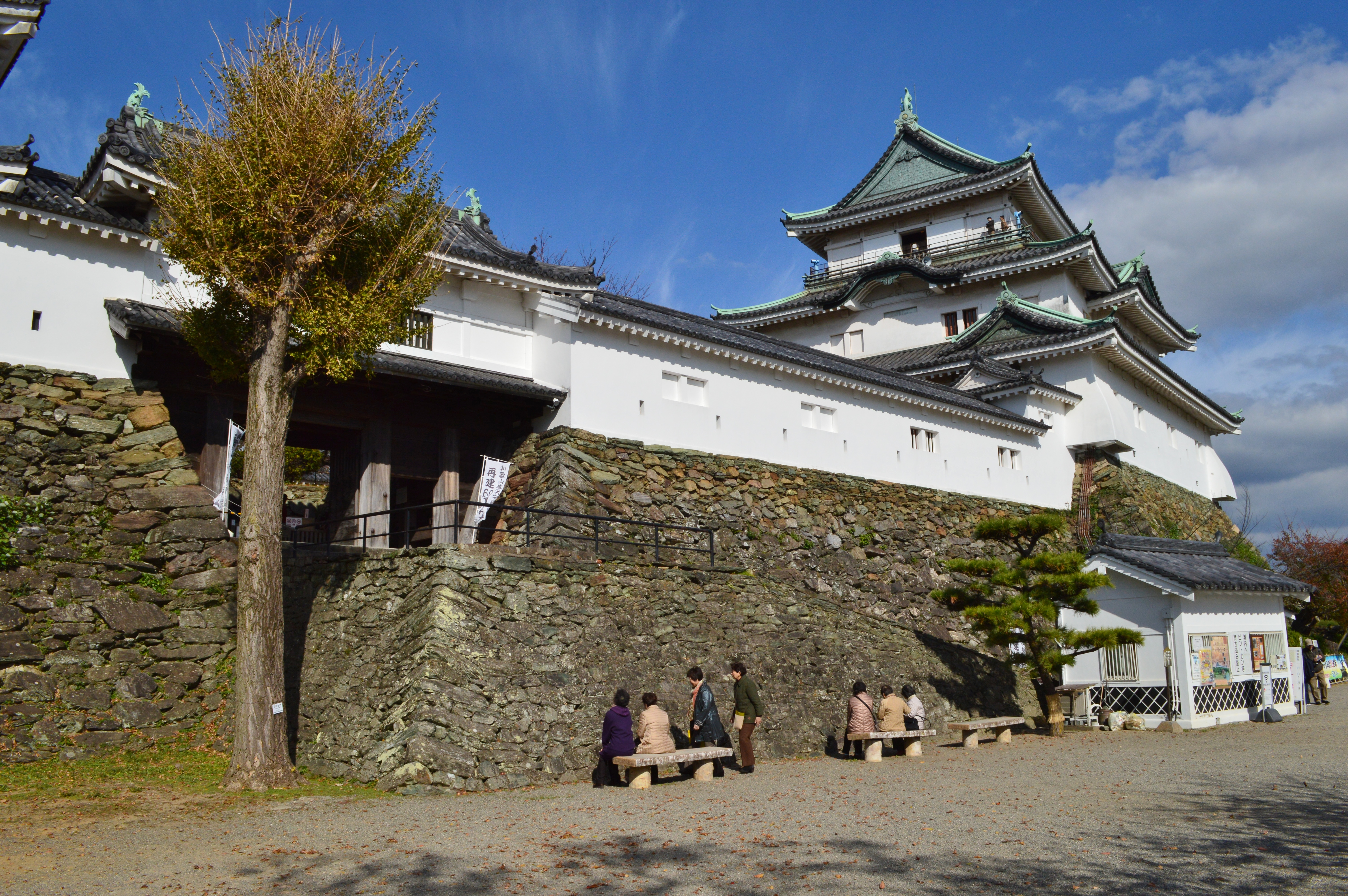 和歌山城 天守・楠門